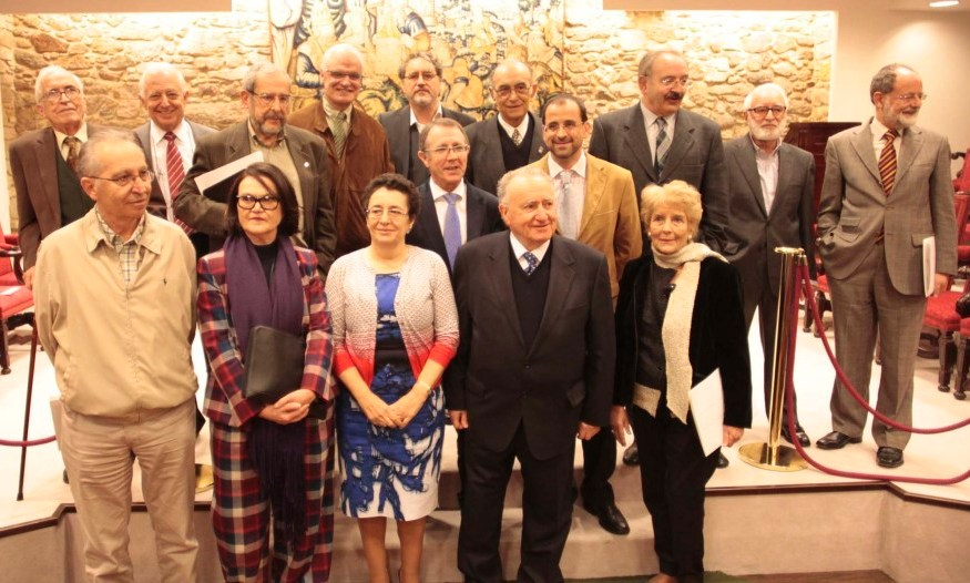 Parte do plenario, tras a votación na RAG do novo presidente, Alonso Montero, en abril de 2013.